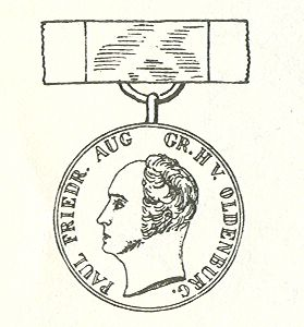 Tekening door Gritzner